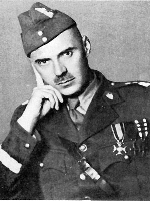 Władysław Anders, Polish General